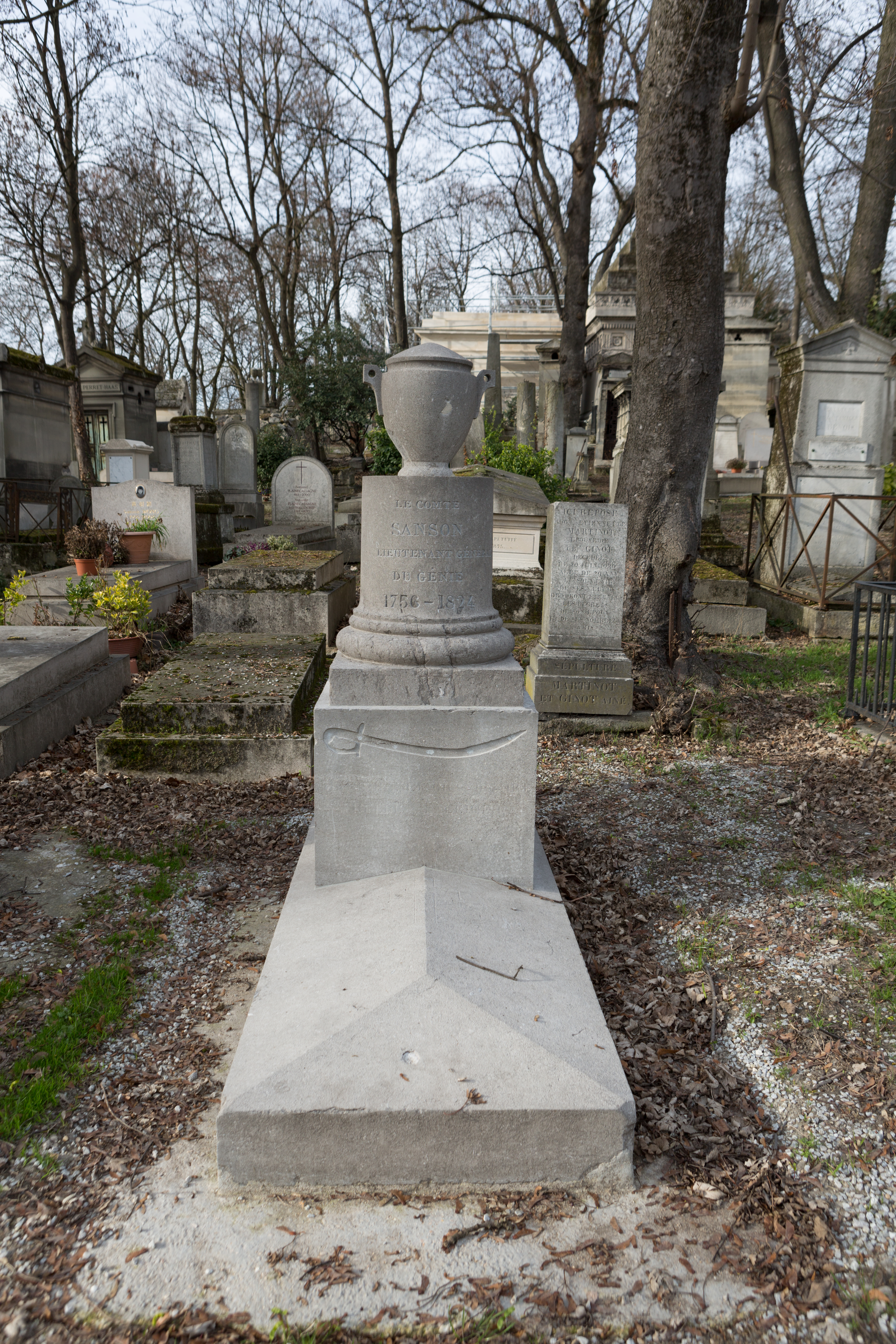 Sépulture de Nicolas-Antoine Sanson (1756-1824), général français de la Révolution et de l'Empire.